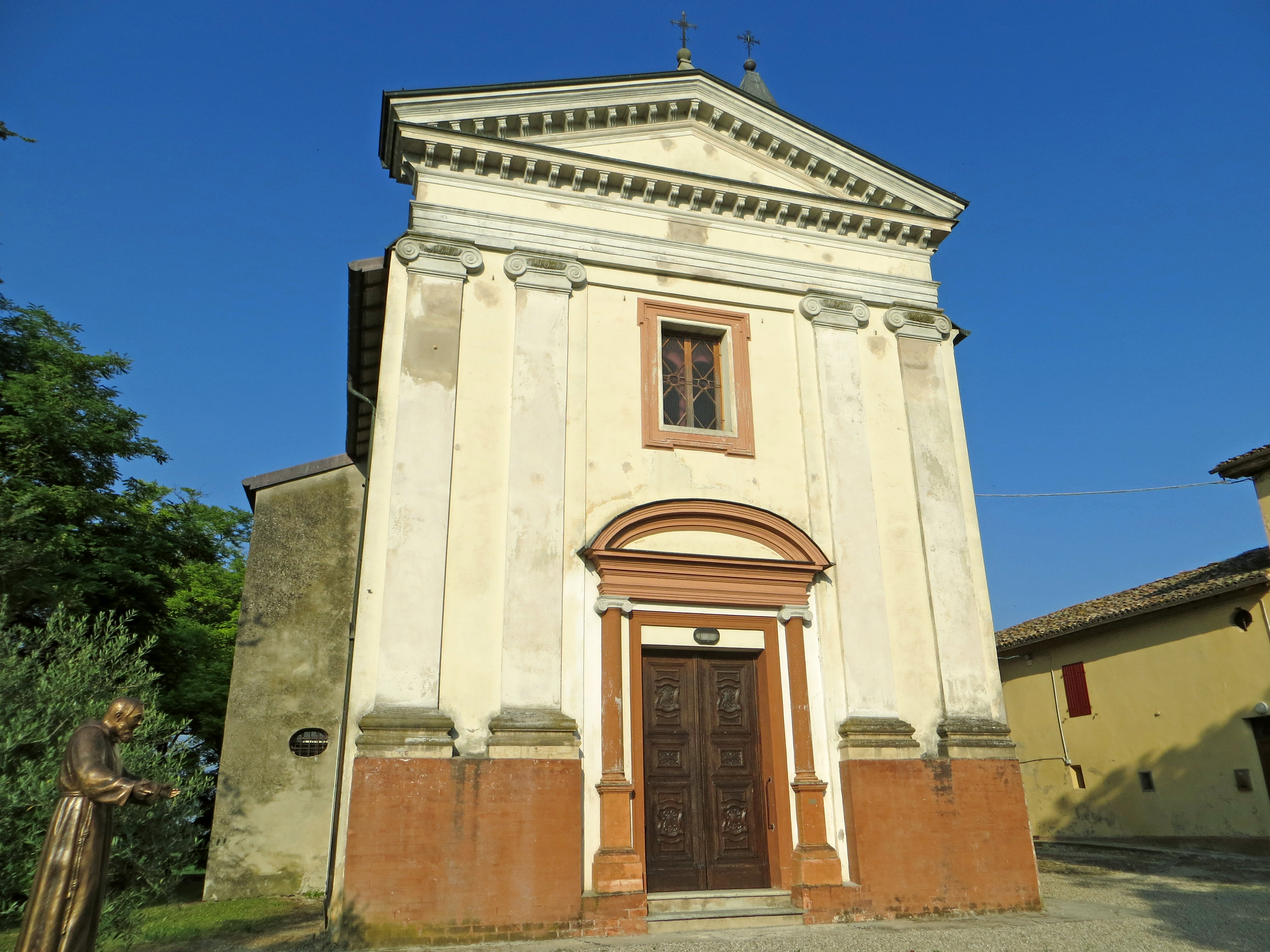 Chiesa della Purificazione di Maria Vergine (Bannone, Traversetolo) - facciata